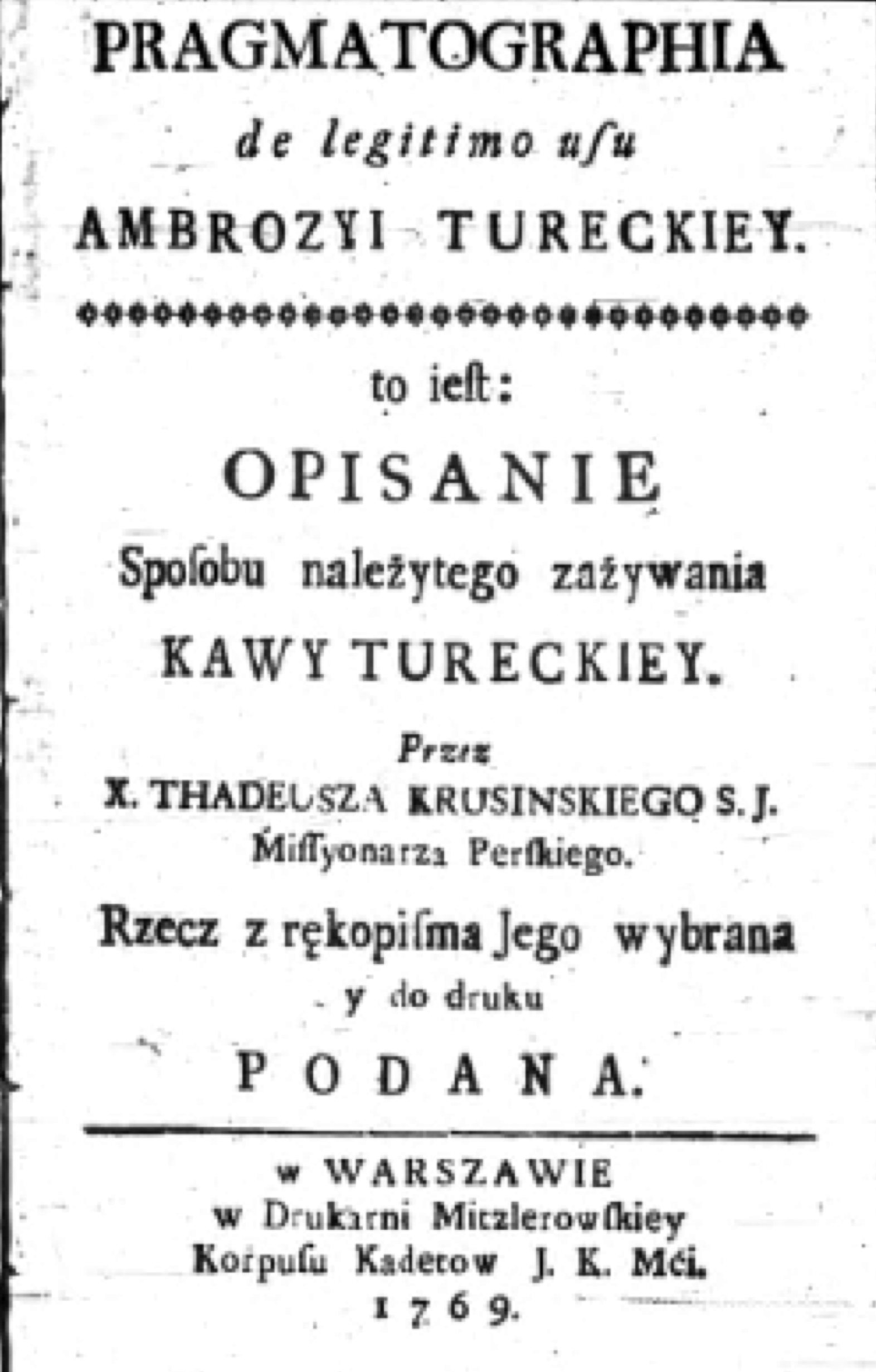 Tadeusz Krusiński, 1769 Pragmatographia Ambrozii Tureckiey